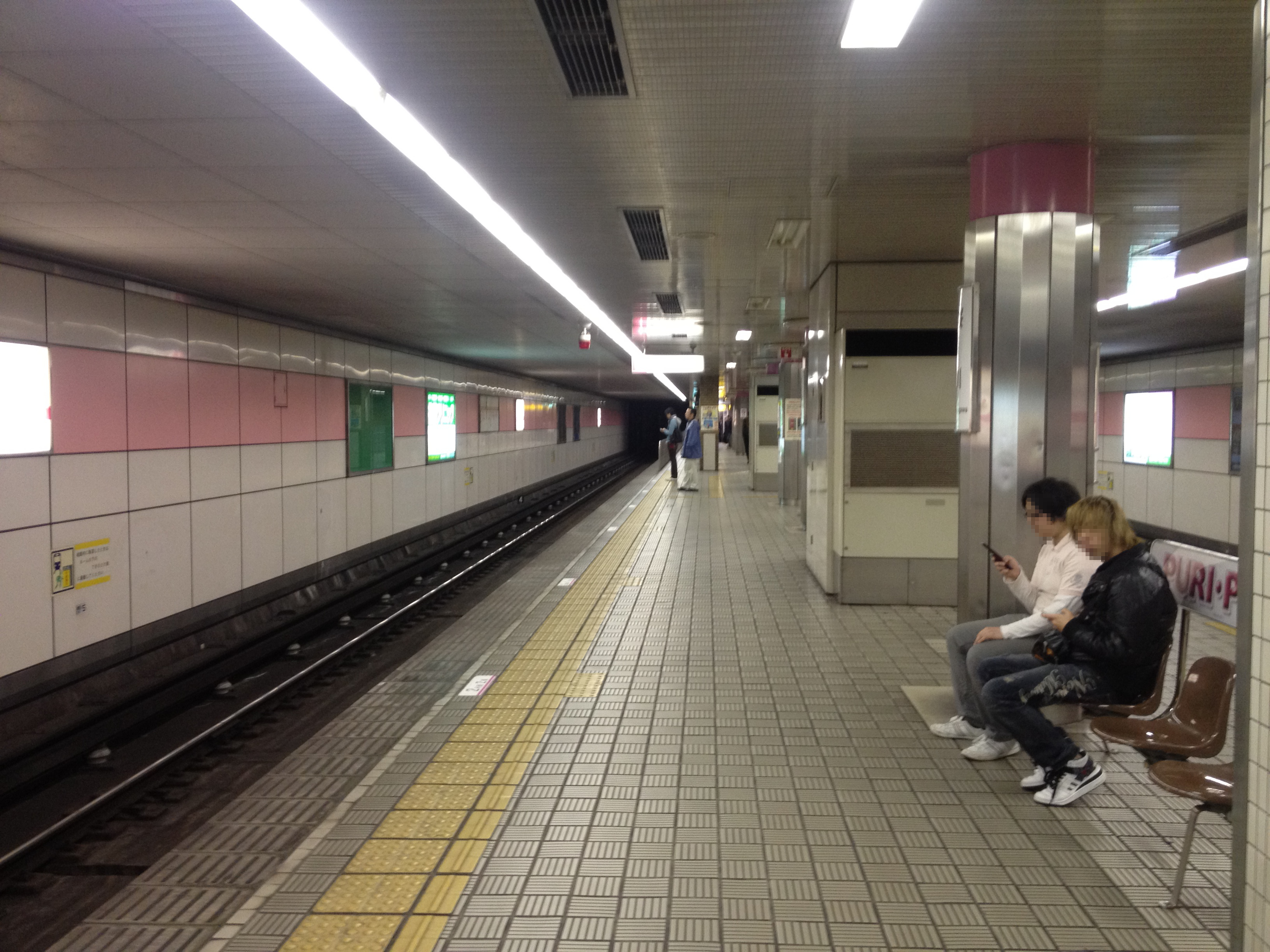 大阪市営地下鉄桜川駅プラットフォーム